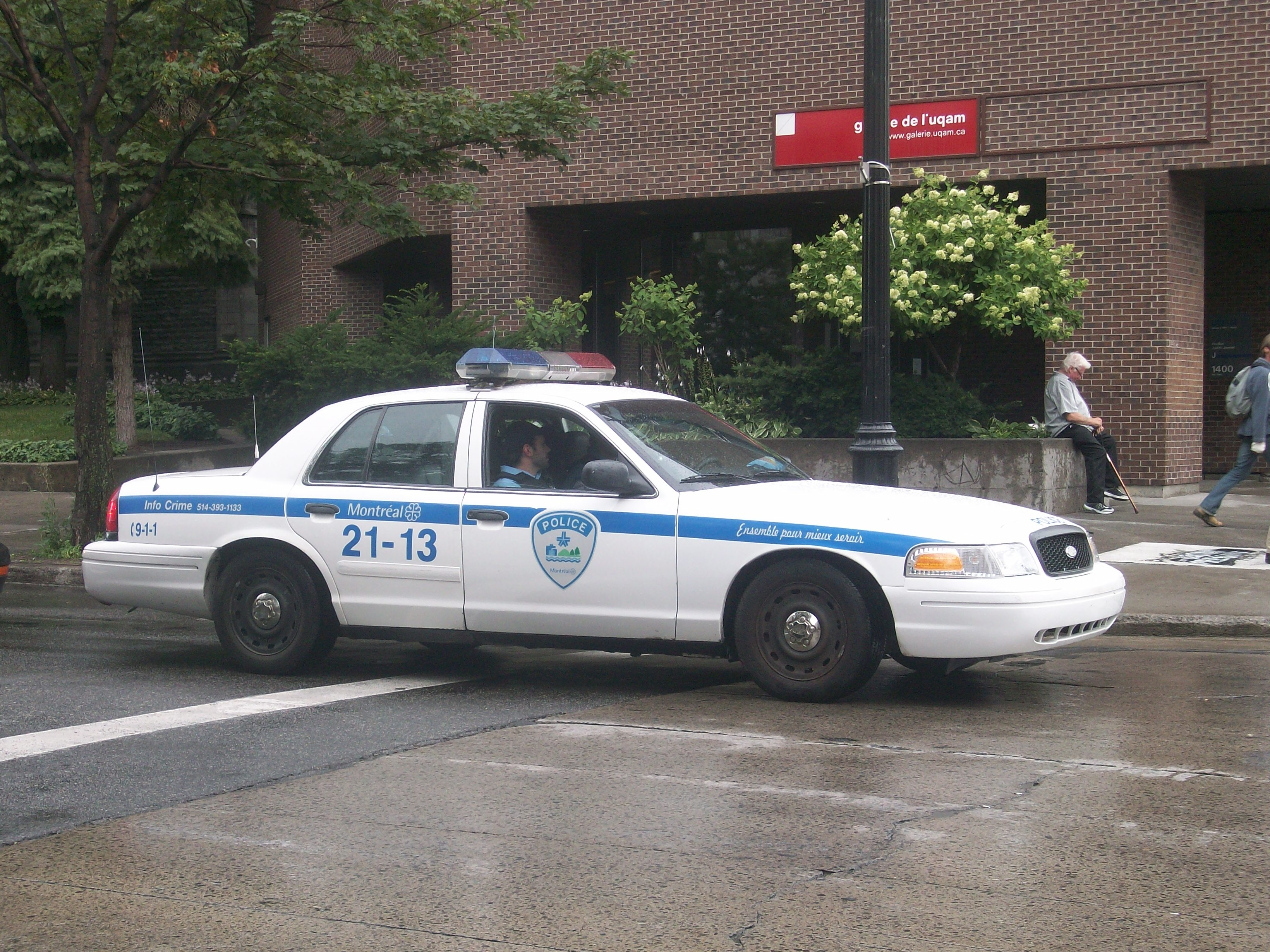 Ford Crown Victoria de la police de Montréal